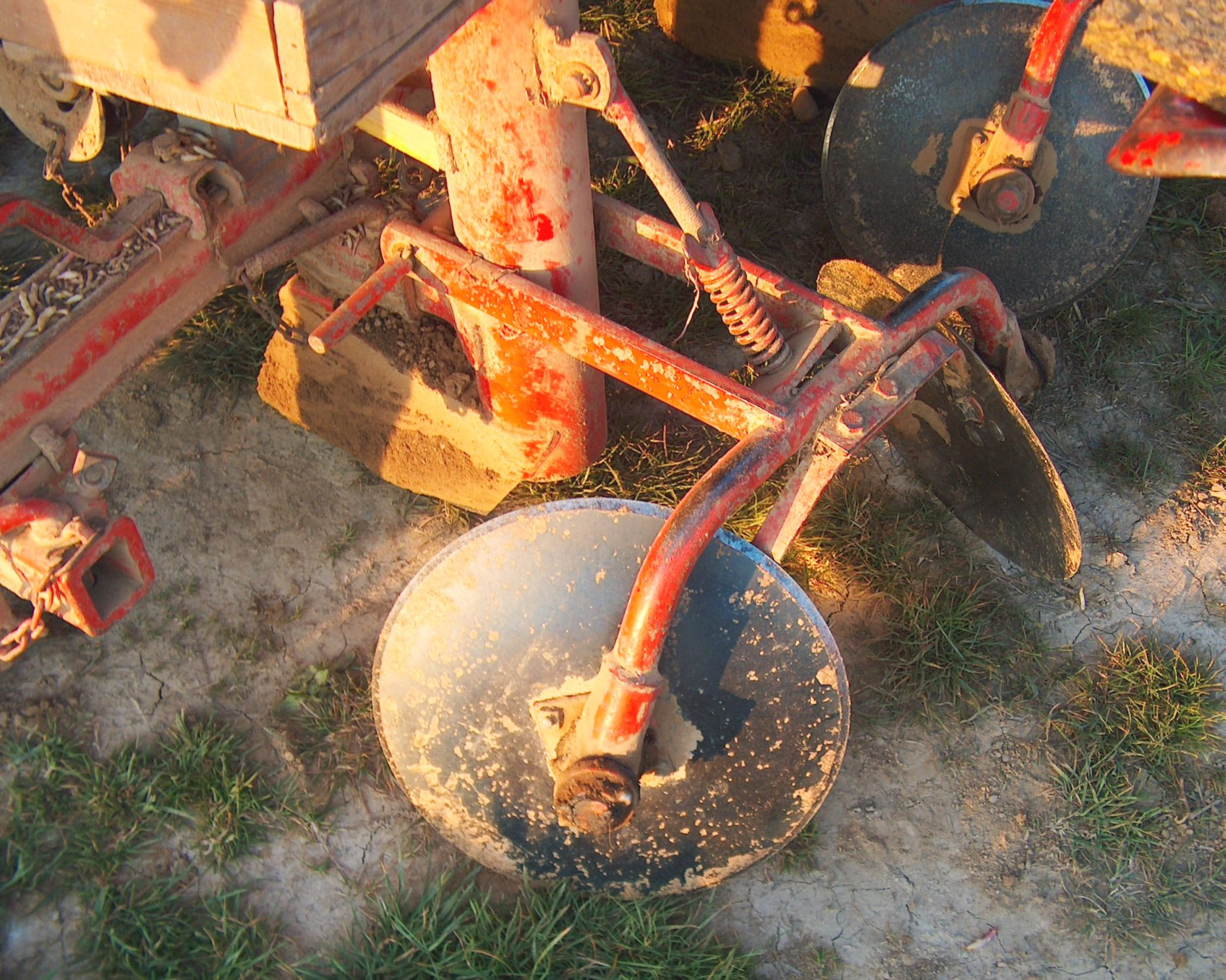 Kartoffellegemaschine